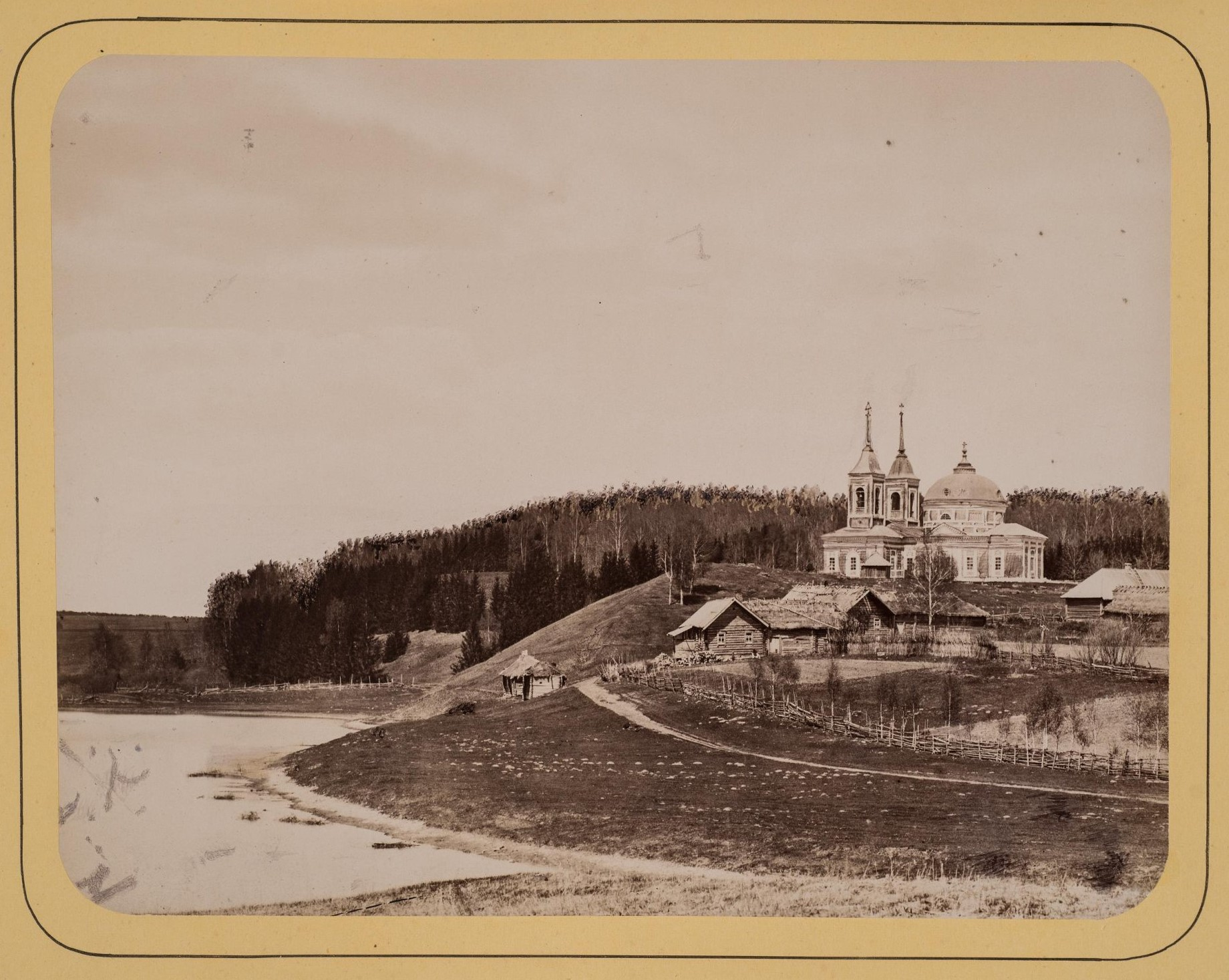 Усадьба А. С. и Е. М Хомяковых Липицы, Сычёвского уезда Смоленской губернии